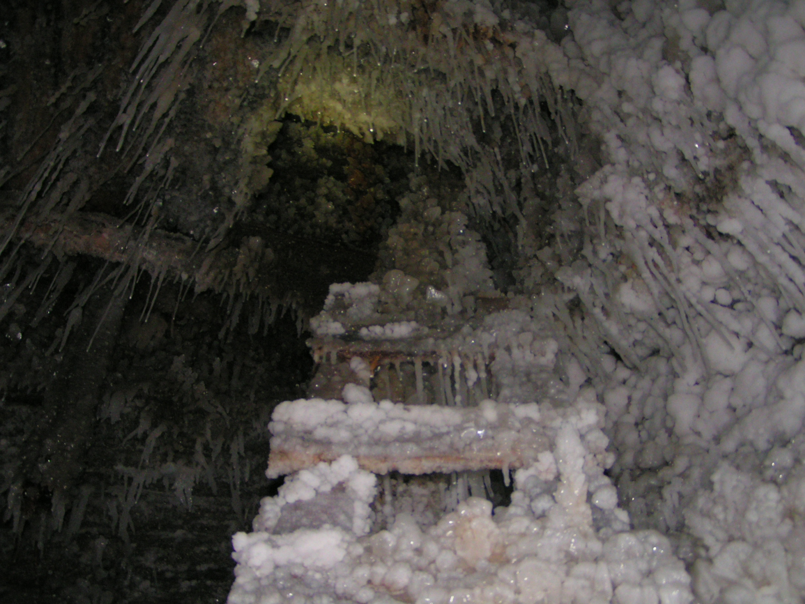 Old Schaft - Salt Mine Wieliczka